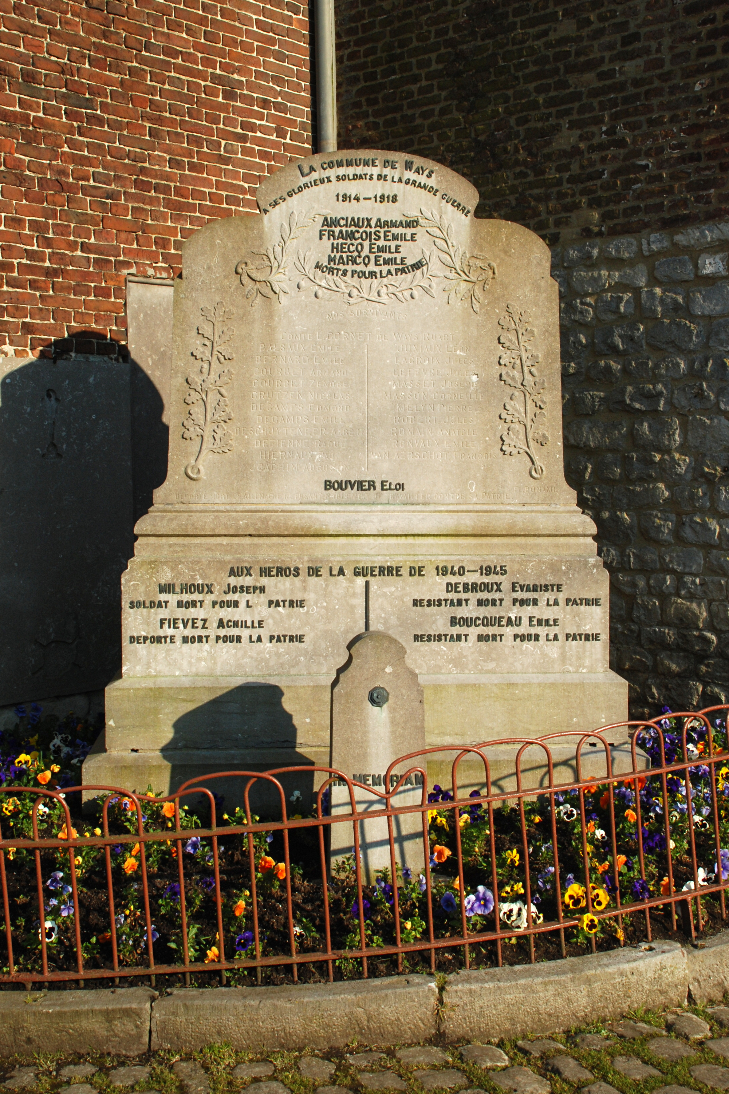 Belgique - Brabant wallon - Ways - Monuments aux Morts adossé à l'église Saint-Martin